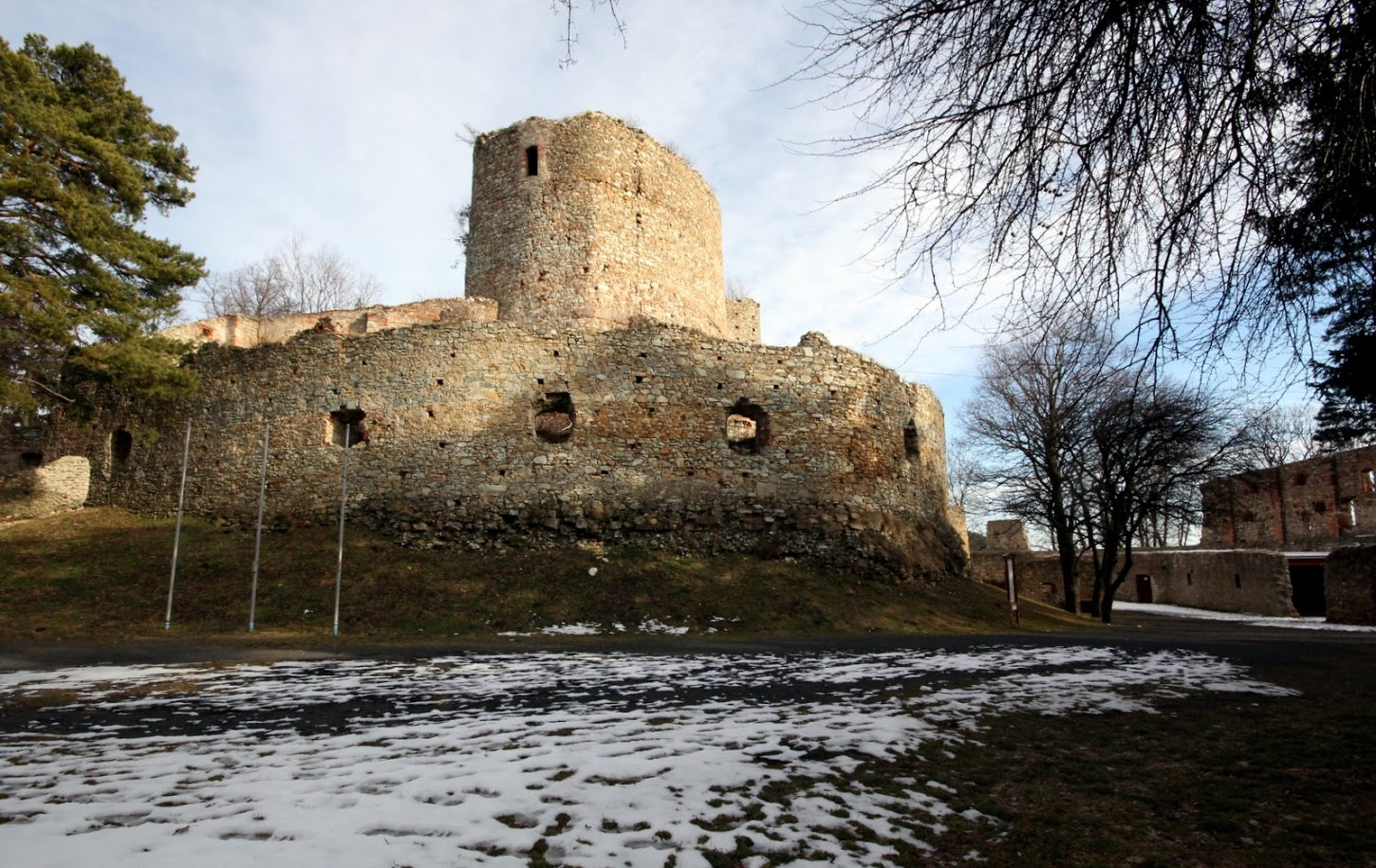 A lánzséri vár